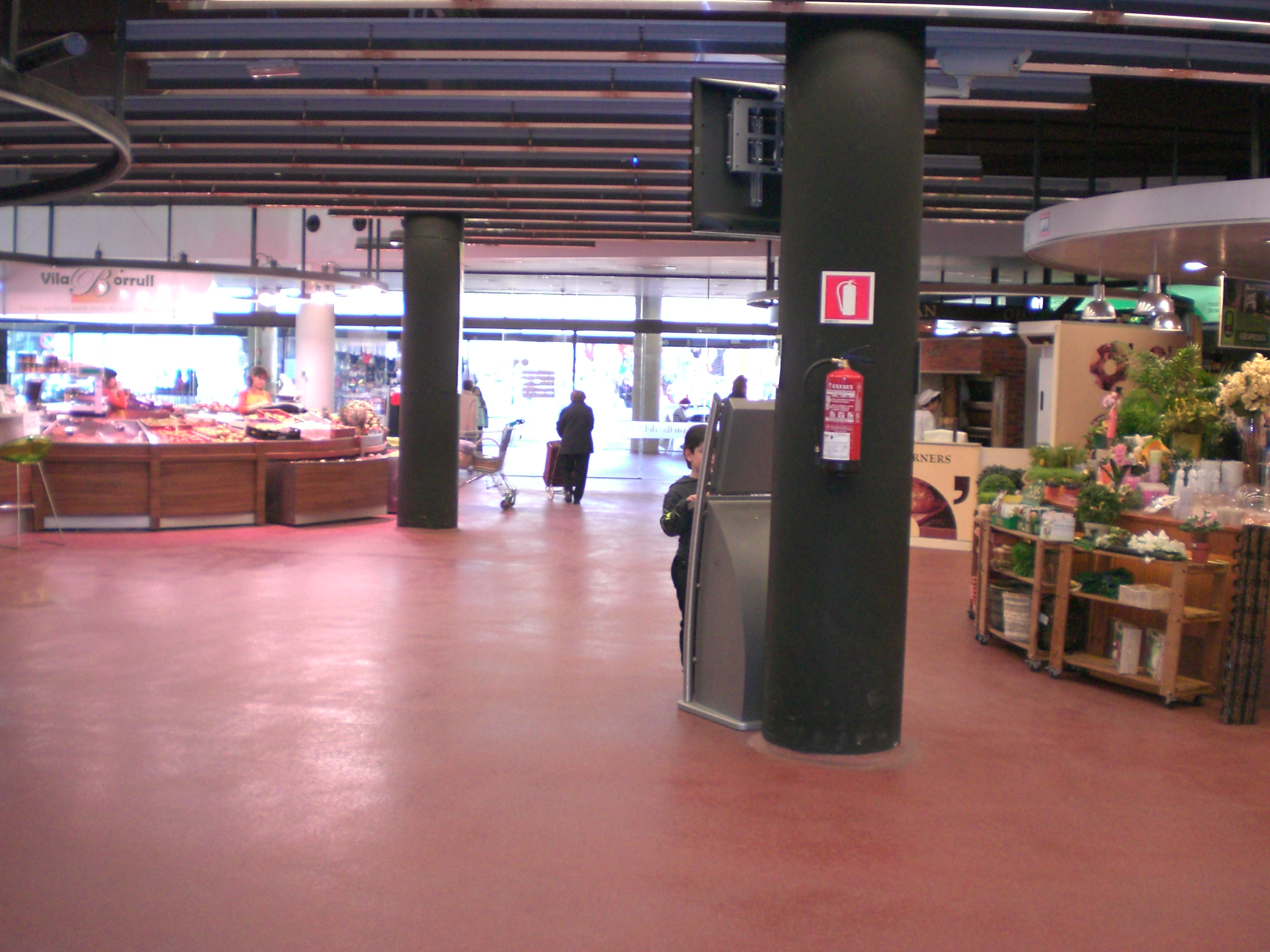 Mercat Municipal de Castellar del Vallès